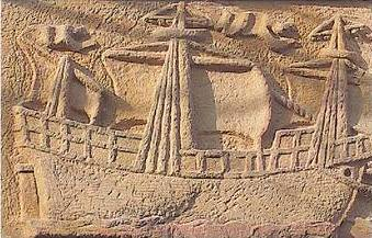 Urasandi baserriko erliebea (Mutriku, Gipuzkoa), XVI. mendekoa